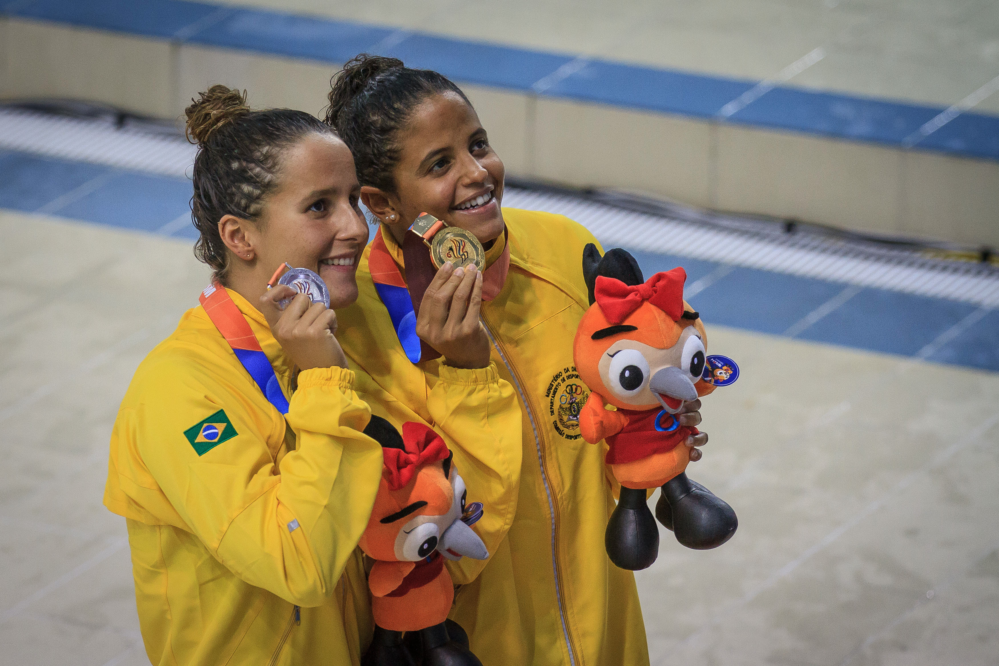 Ouro para Etiene e prata para Natália de Lucas nos 100m costas em Gimcheon pelos 6º Jogos Mundiais Militares. Foto: Sgt Johnson Barros